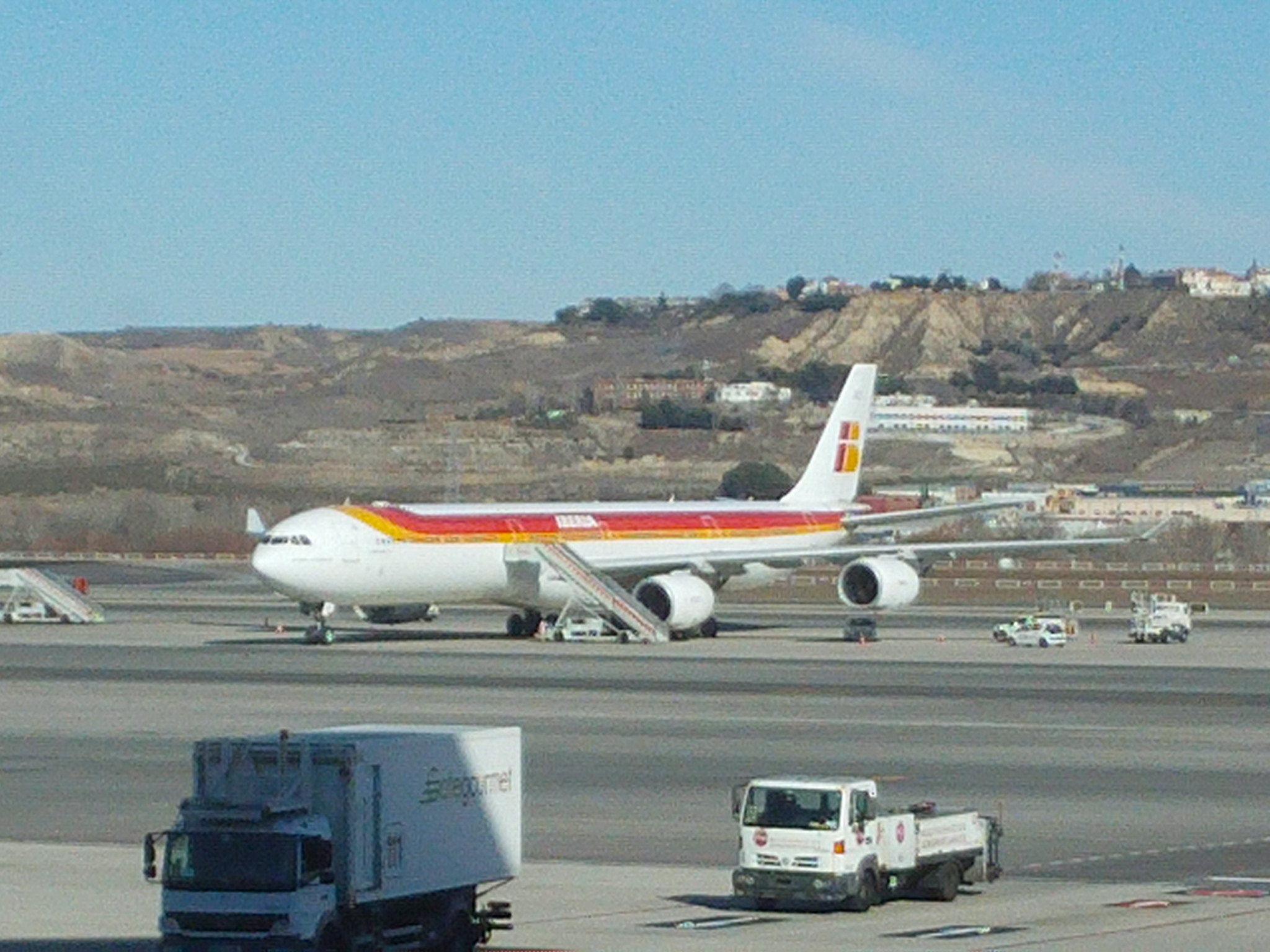 Airbus A340-600 de Iberia en el Aeropuerto de Madrid-Barajas